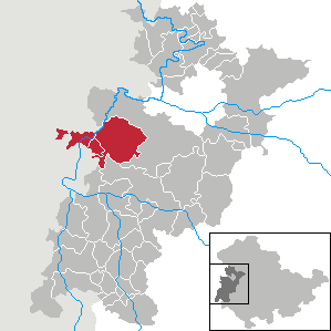 Verwaltungsgemeinschaft Berka/Werra in Thuringia - Wartburgkreis